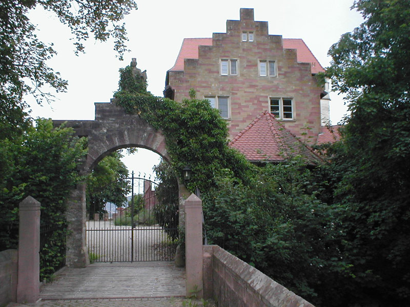 Schloss Neuburg in Obrigheim (Baden)